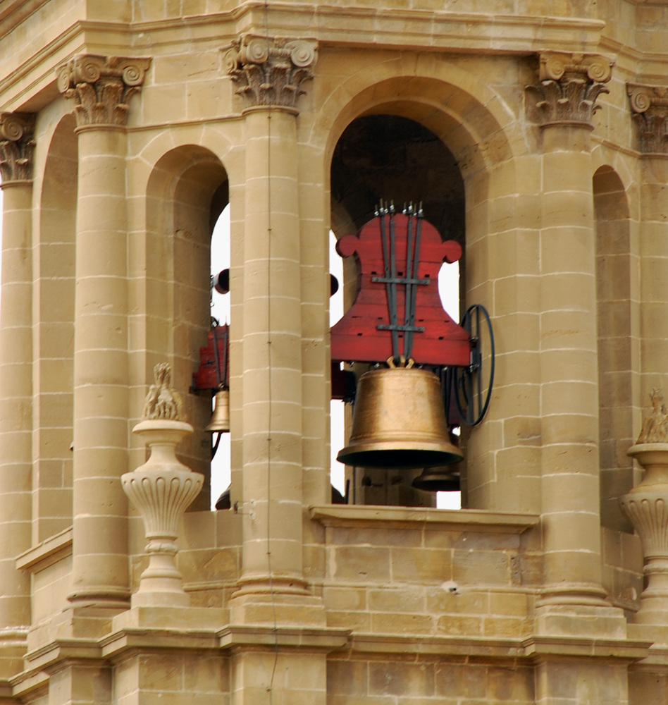 Torre restaurada de la catedral de Pamplona.